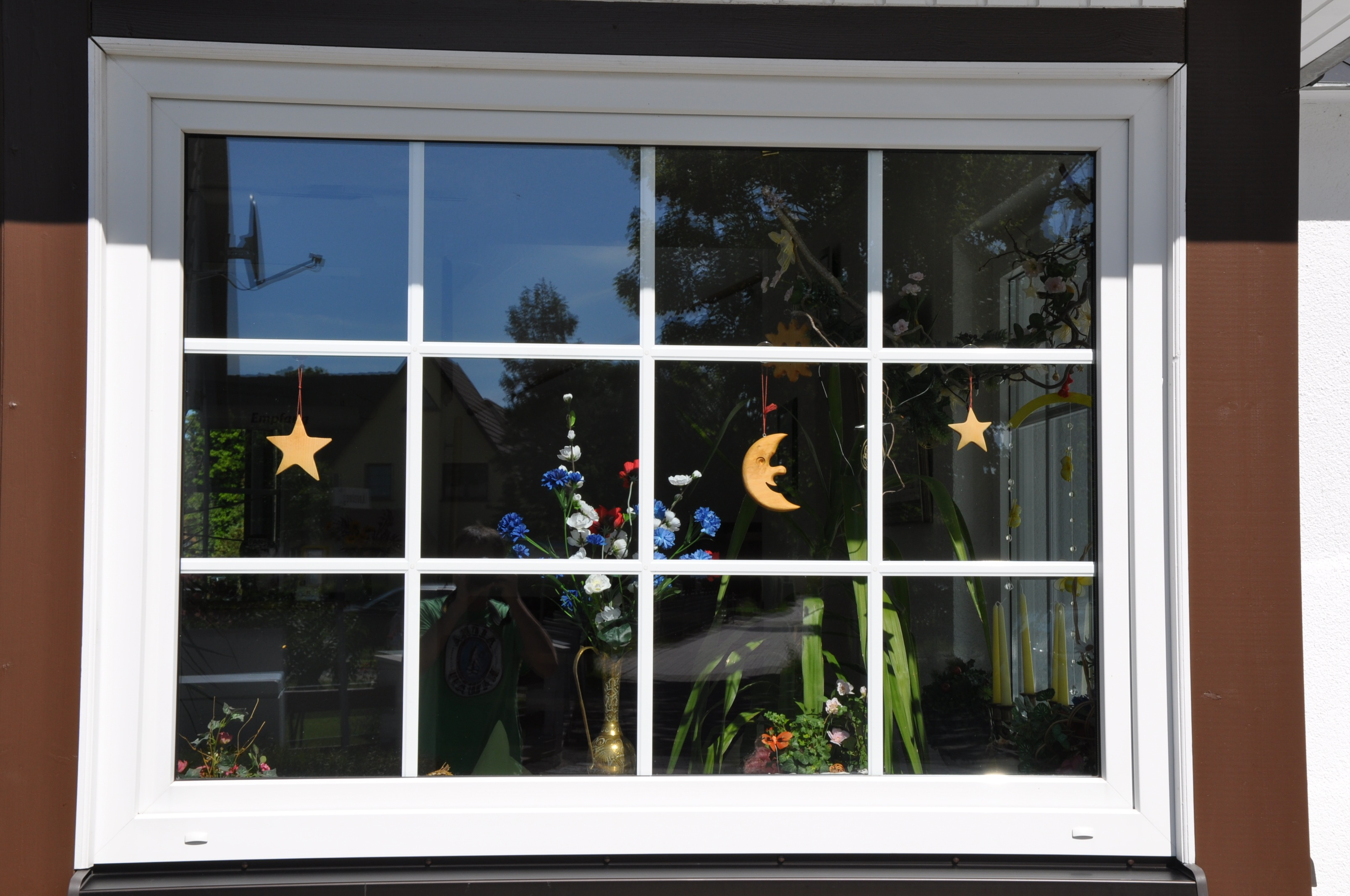 Sprossenfenster.